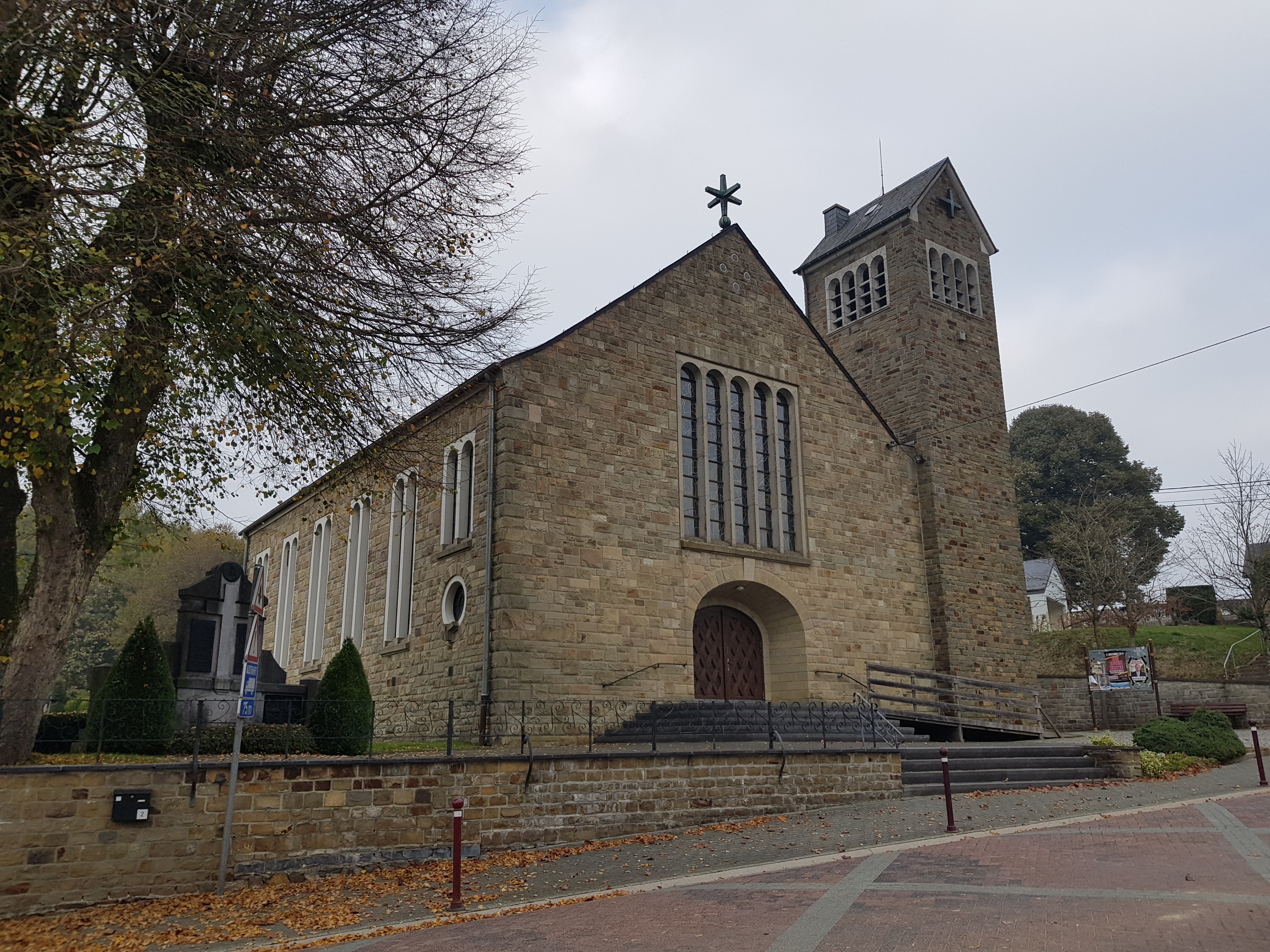 Kirche St. Kornelius, Rodt, Sankt Vith, Belgien